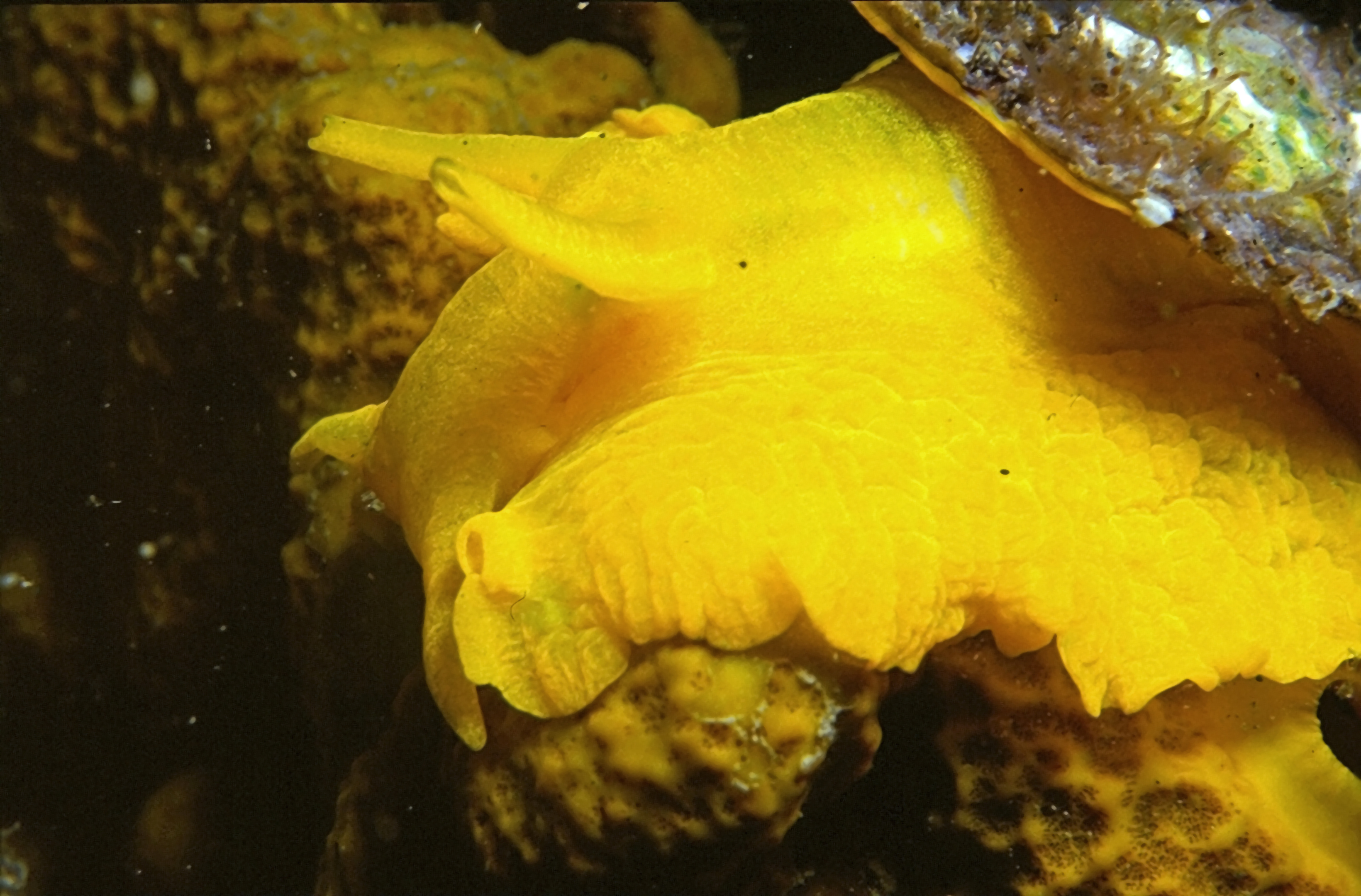 Tylodina perversa (Gmelin, 1791), Aplysina aerophoba Nardo, 1843 - Banyuls-sur-Mer : 08/85